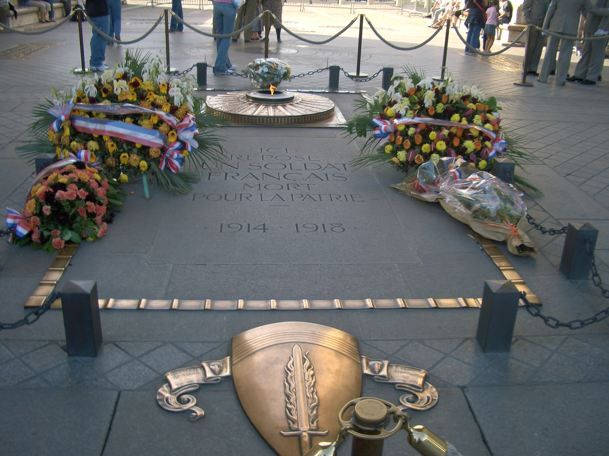 Foto, tomada el viernes 30 de septiembre de 2005, de la Tumba del soldado desconocido bajo el Arco del Triunfo, en París, Francia.